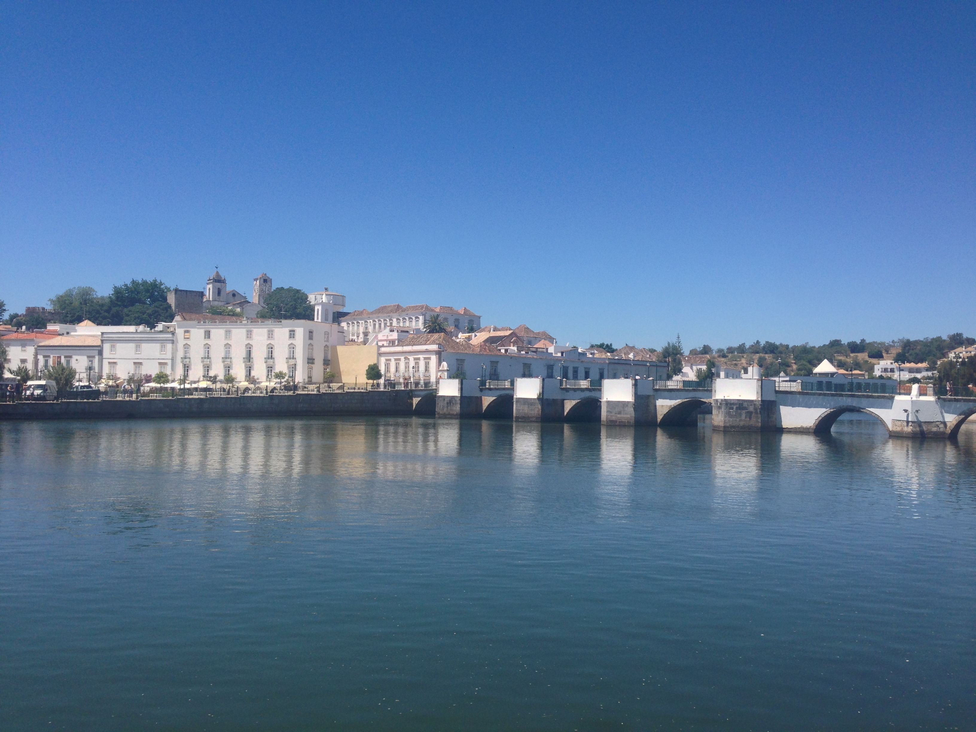 Roman bridge, Tavira, Portugal